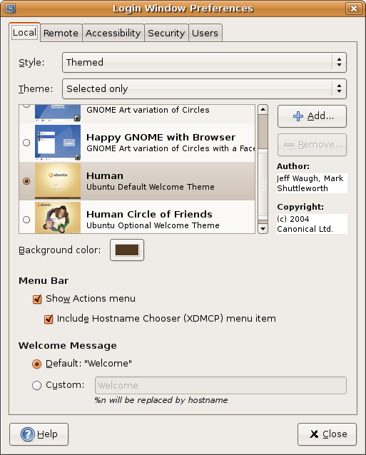 GDM setup tool, under Ubuntu 6.06